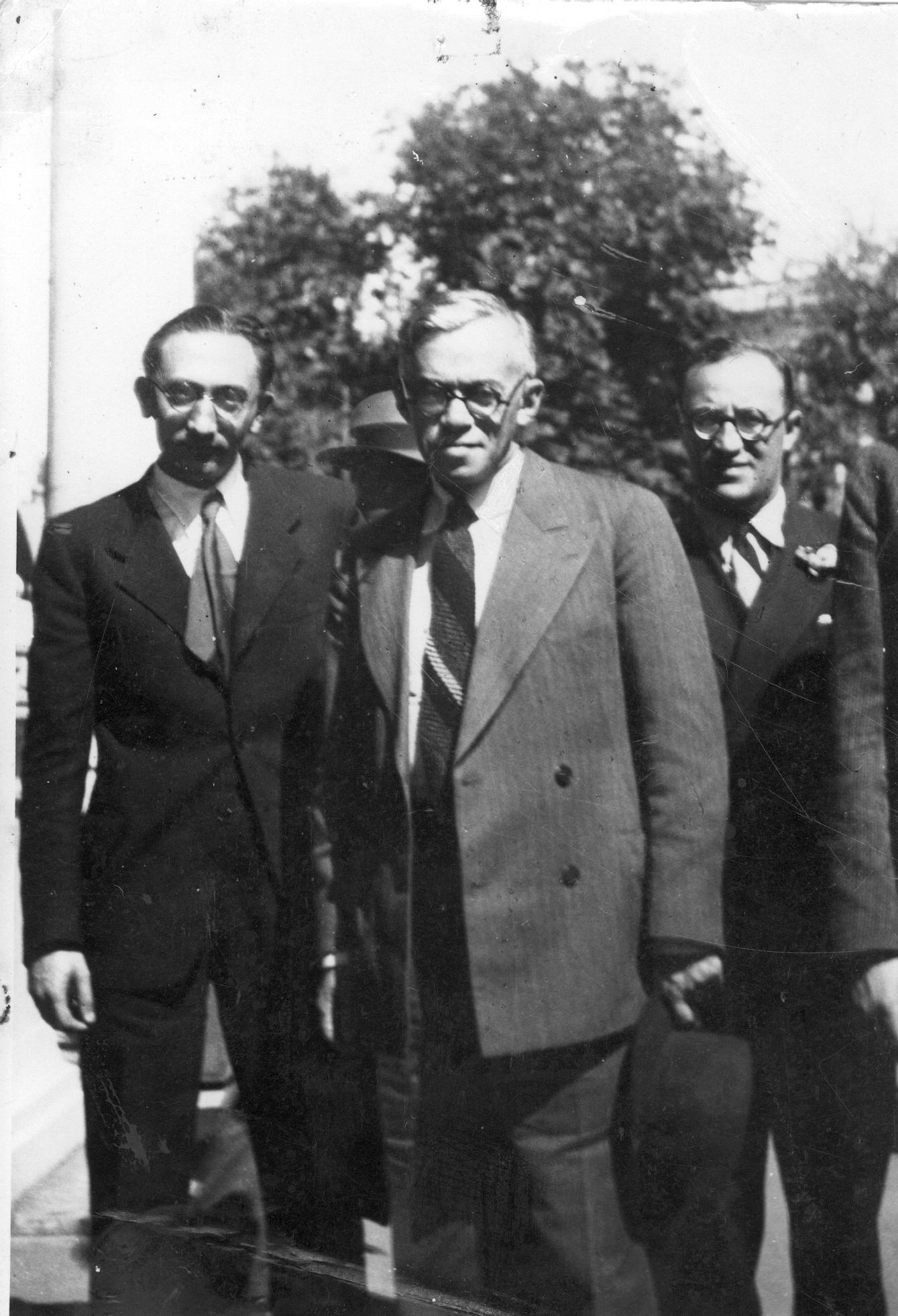 אייזיק רמבה מימין, זאב ז'בוטינסקי (במרכז) ויוסף קופלביץ', וינה - אוסטריה, 1937. - התצלומים מארכיון מכון ז'בוטינסקי